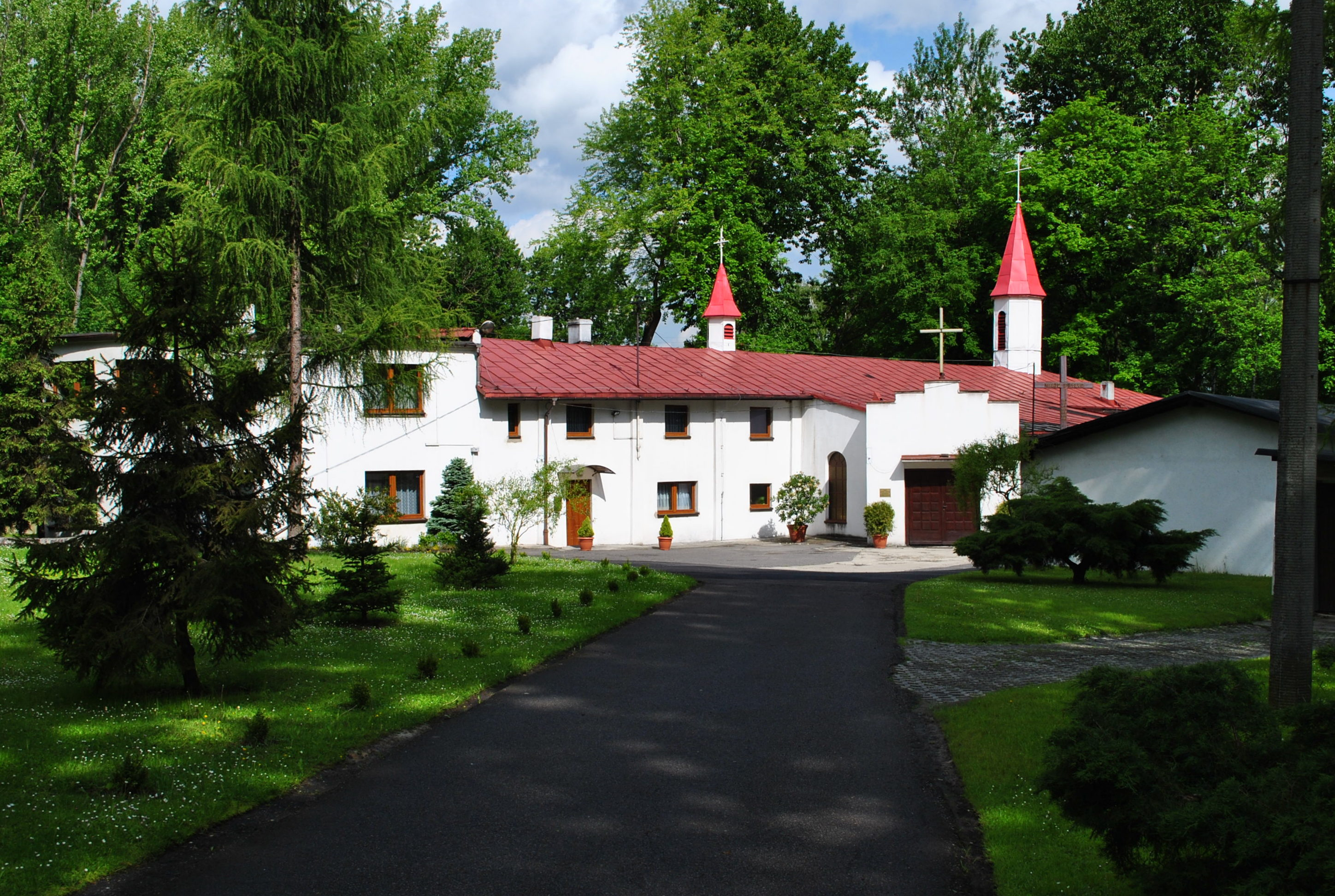 Katowice - Załęska Hałda. Kościół św. Cyryla i Metodego